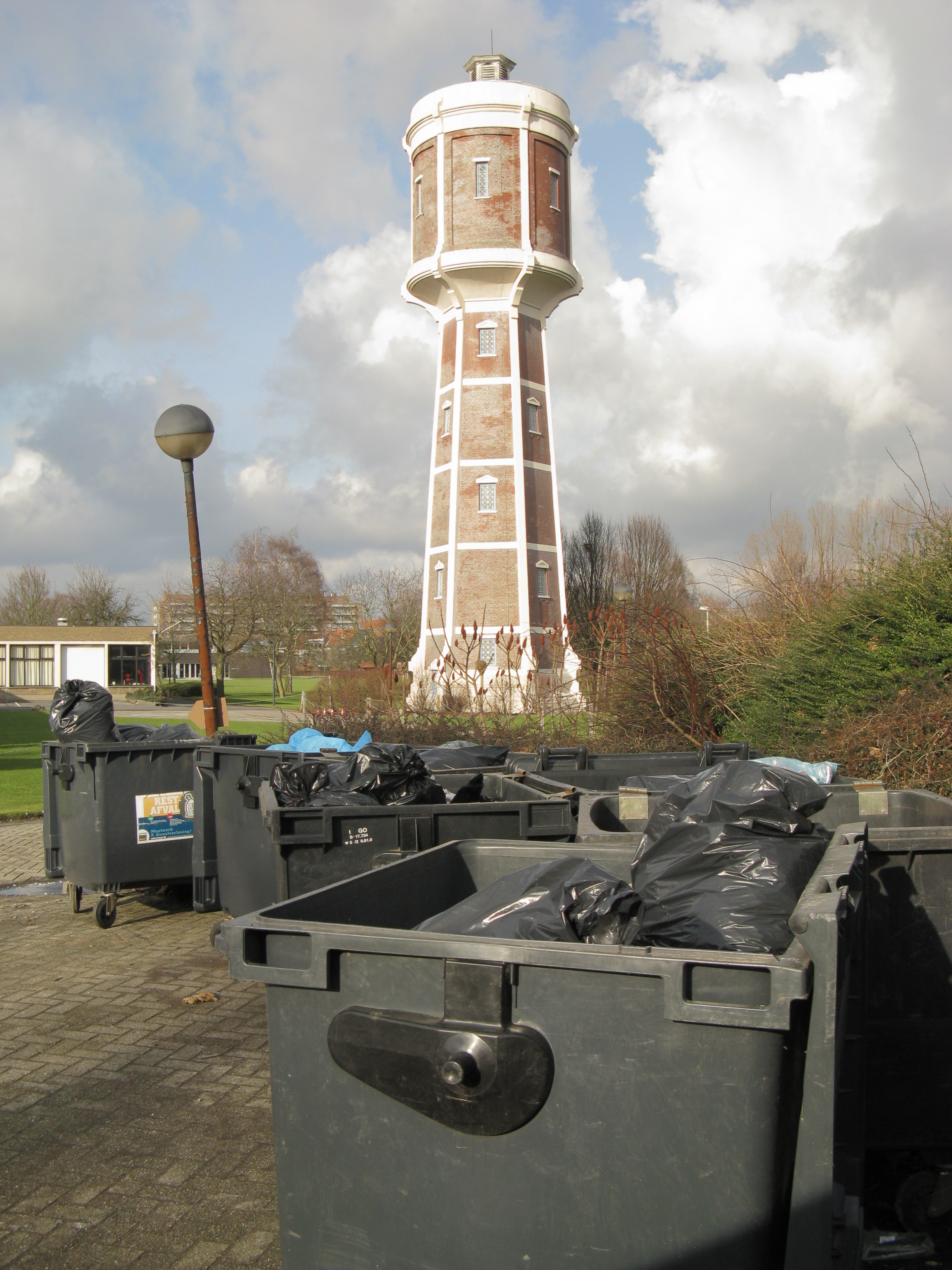 Watertoren op het domein van de psychiatrische instelling en museum Dr. Guislain in Gent.